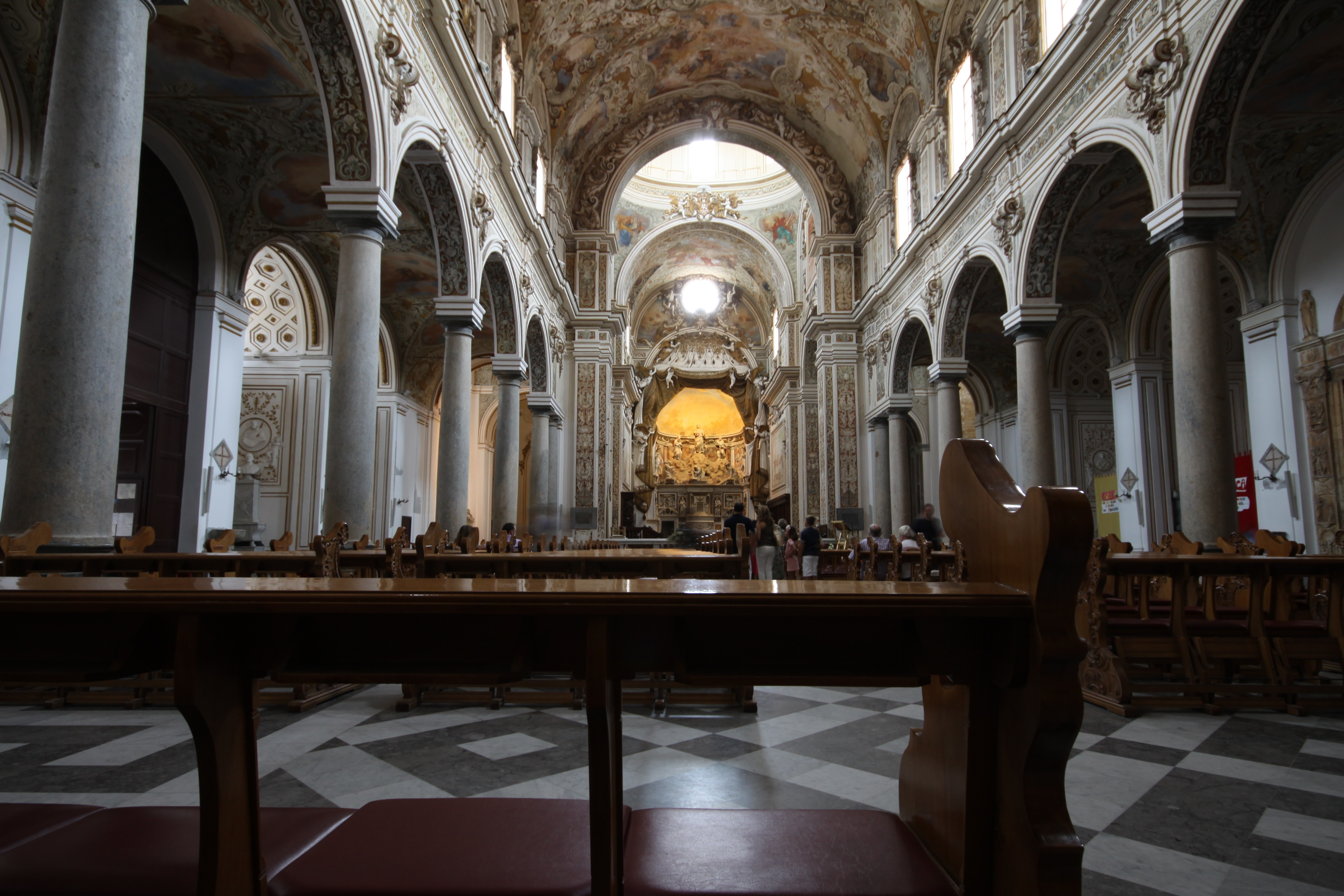 Cathedral (Mazara del Vallo), interior